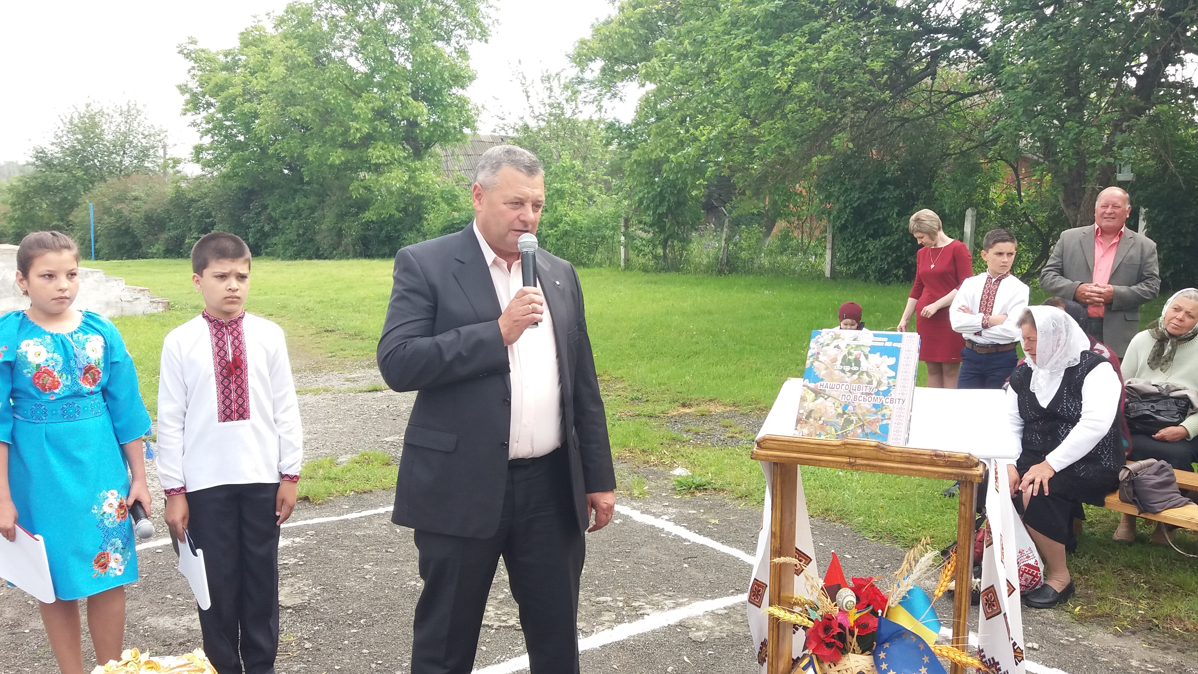 Володимир Заліщук на святі останнього дзвоника. Колиндянська загальноосвітня школа І-ІІІ ступенів.